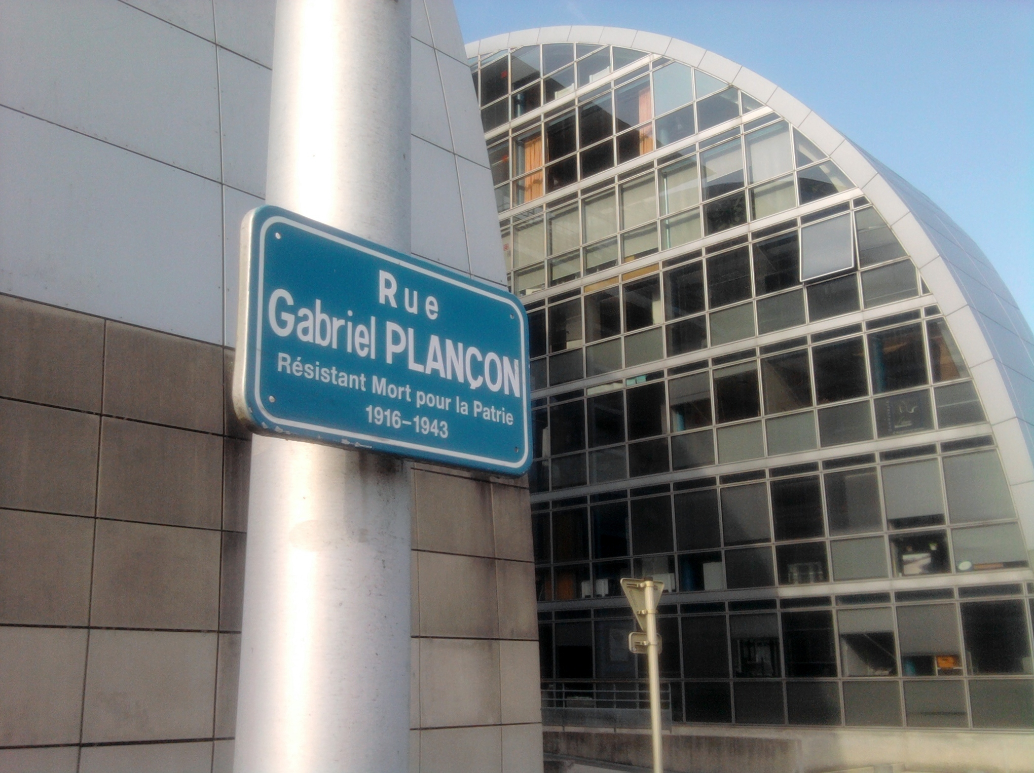 Plaque de la rue Gabriel Plançon (1916-1943) à Besançon.